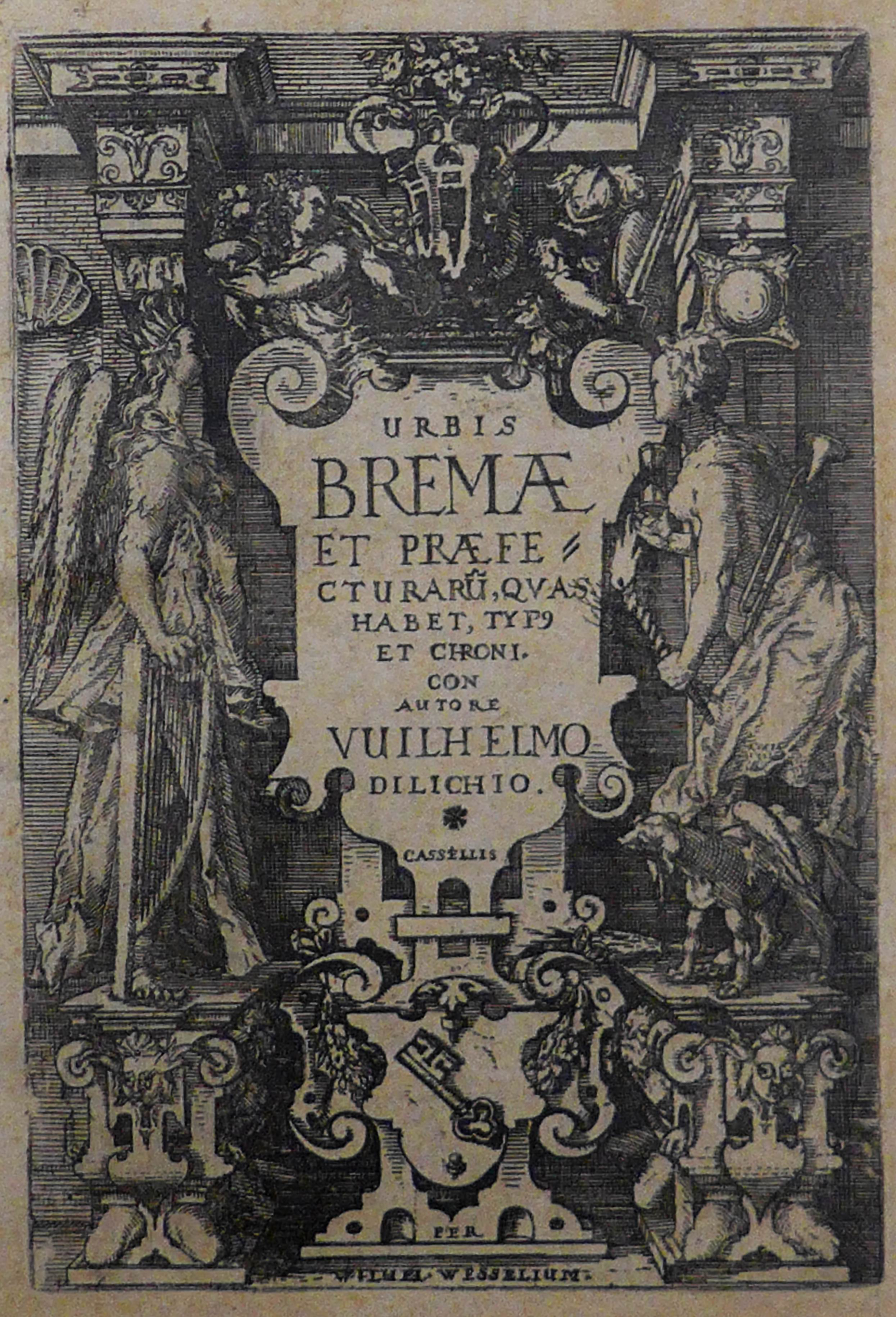 Frontispiz, Titelblatt der Bremer Chronik von Wilhelm Dilich, 1604.